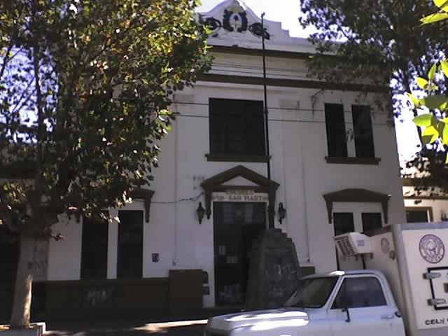 Escuela General San Martín fundada a fines del siflo 19 en ciudad de Pontevedra, Provincia de Buenos Aires, Argentina.